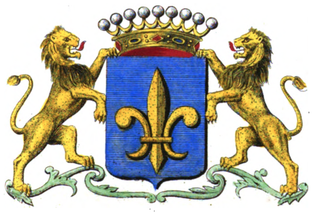 Armoiries de la famille van Eyll